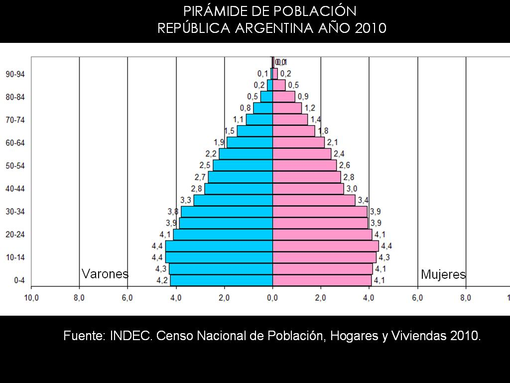 PIRAMIDE DE POBLACION. REPUBLICA ARGENTINA. AÑO 2010